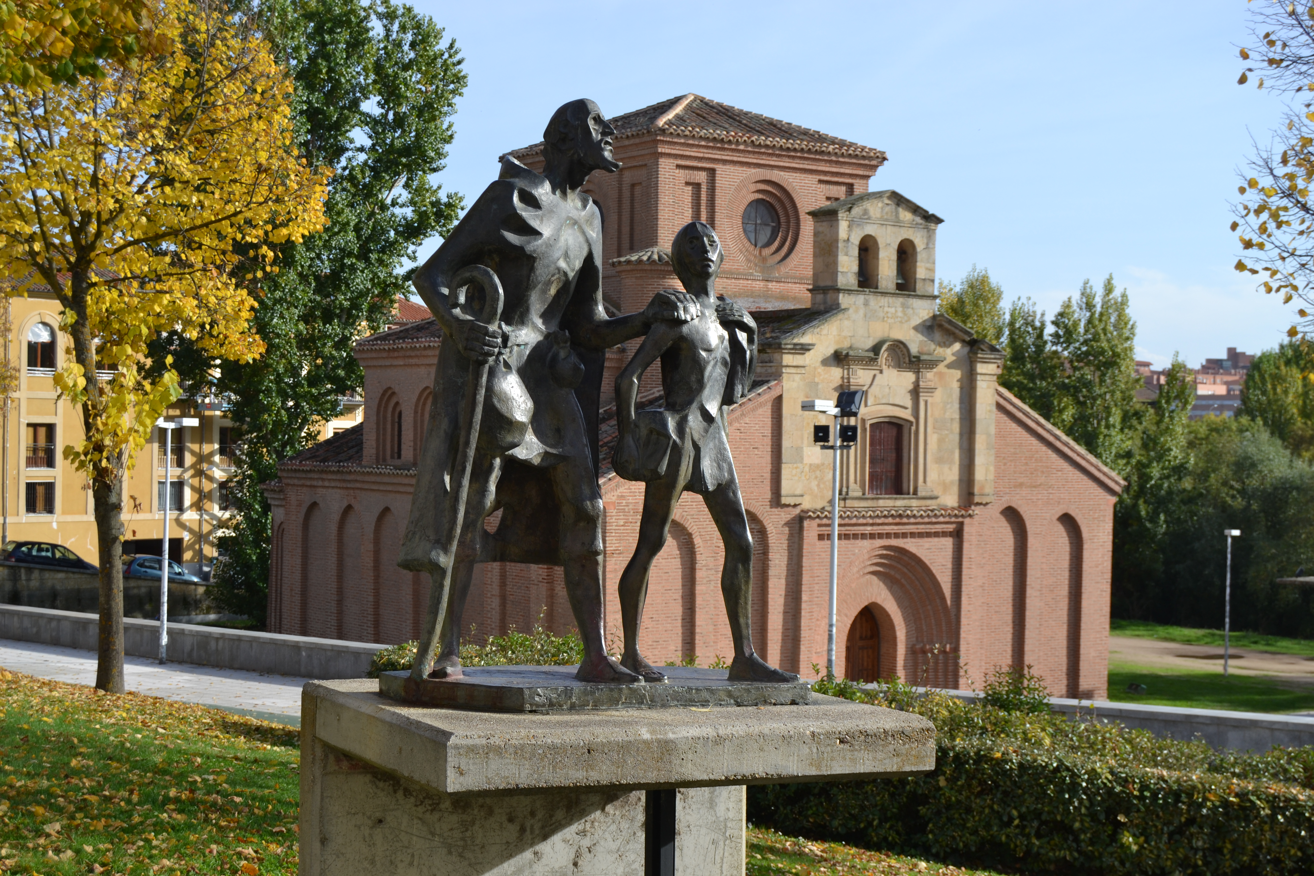 Salamanca, Castilla y León, España. Octubre de 2016.